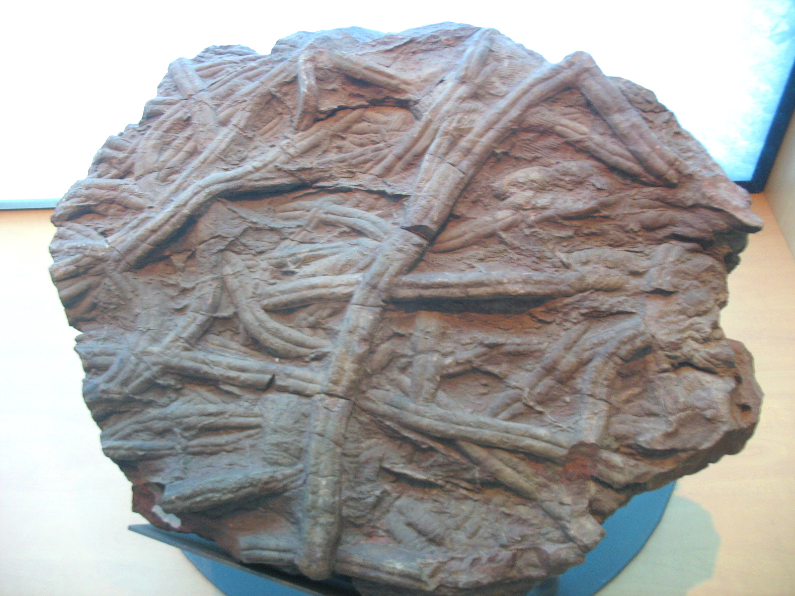 Cruziana sp. Ejemplar del Museo Nacional de Ciencias Naturales (Madrid, España)